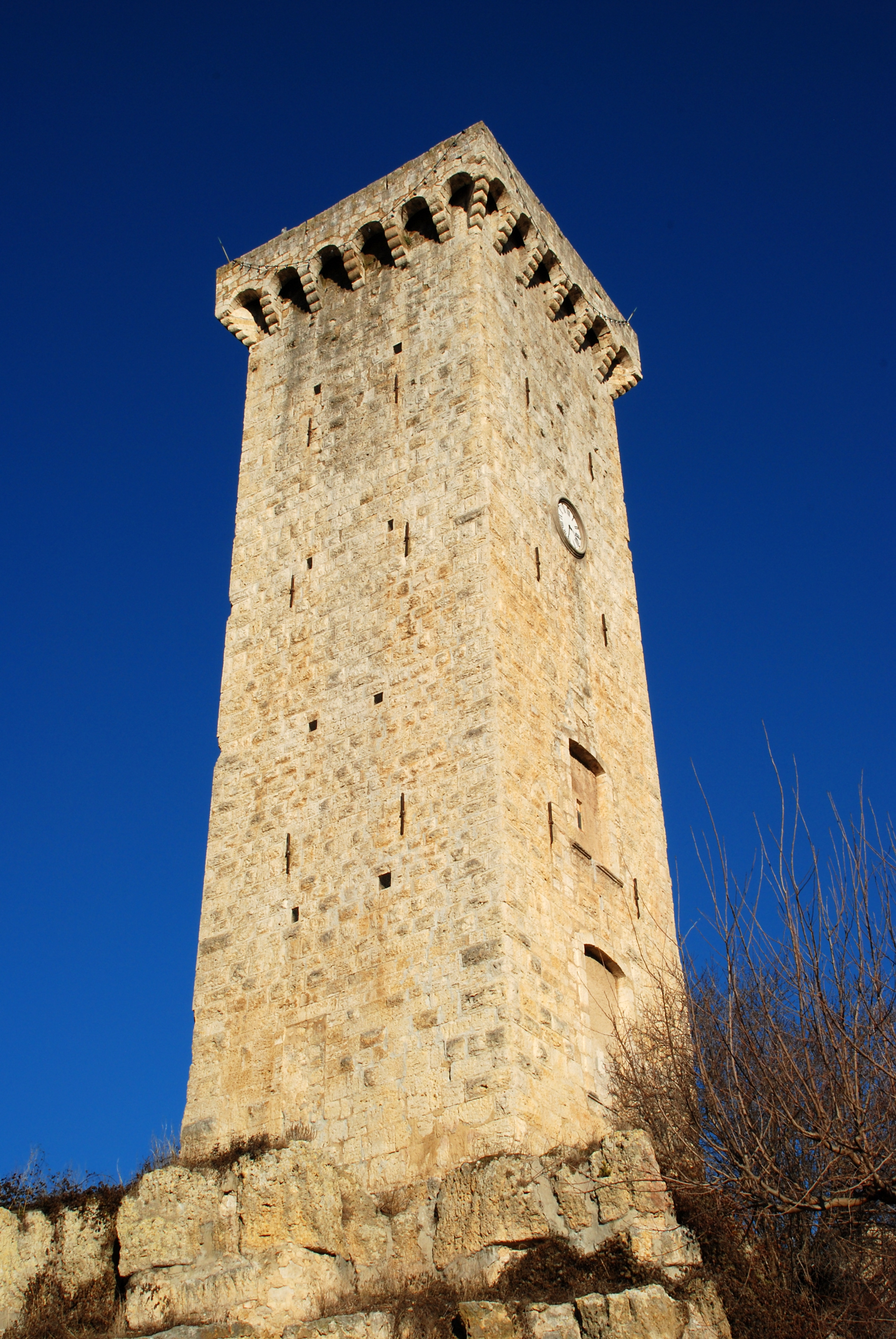 France - Provence - Tour de l’horloge de Saint-Martin-de-Brômes